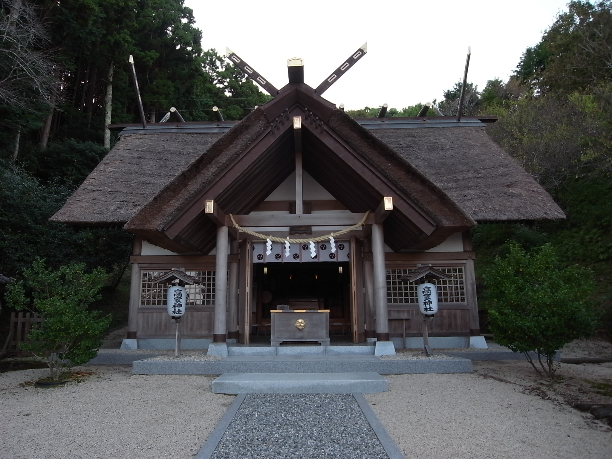 高家神社（たかべじんじゃ）拝殿 （千葉県南房総市）